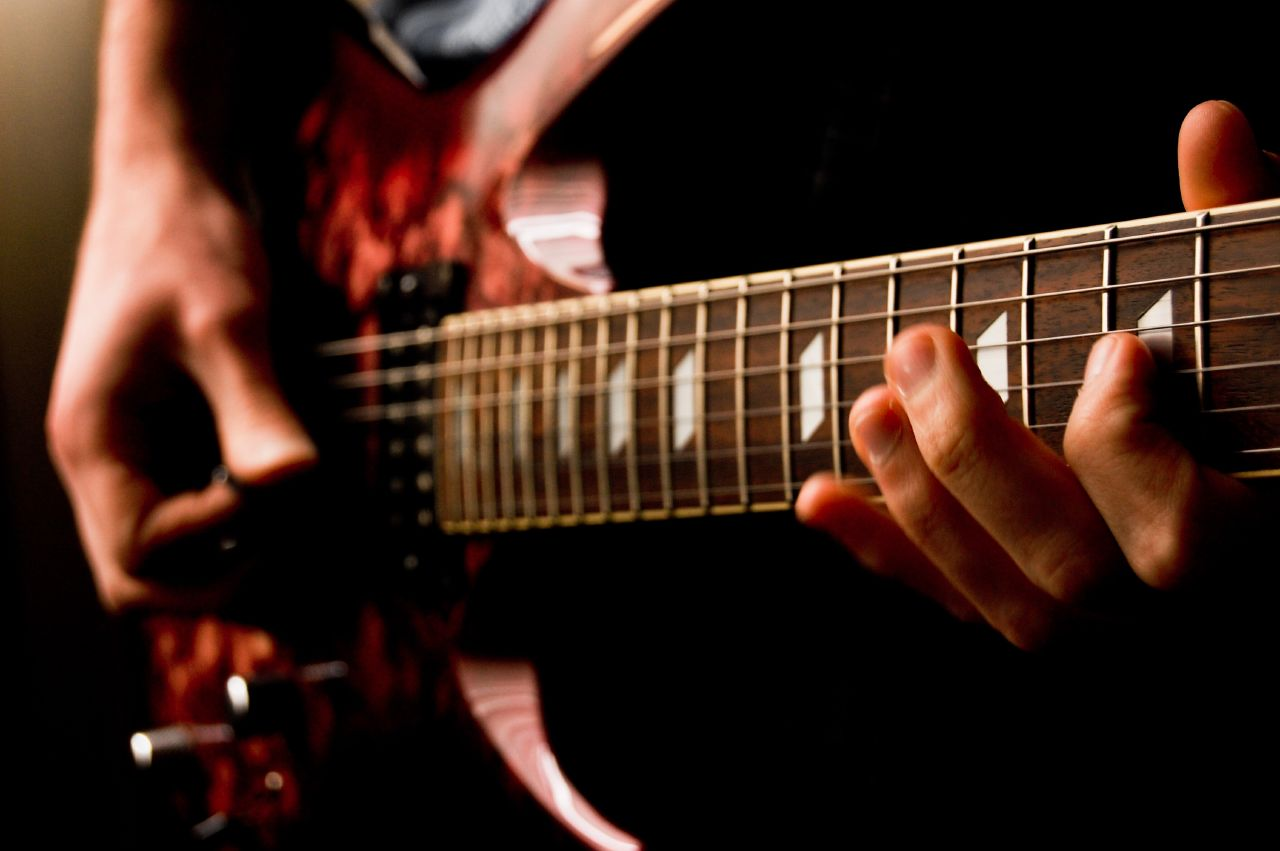 Electric guitar